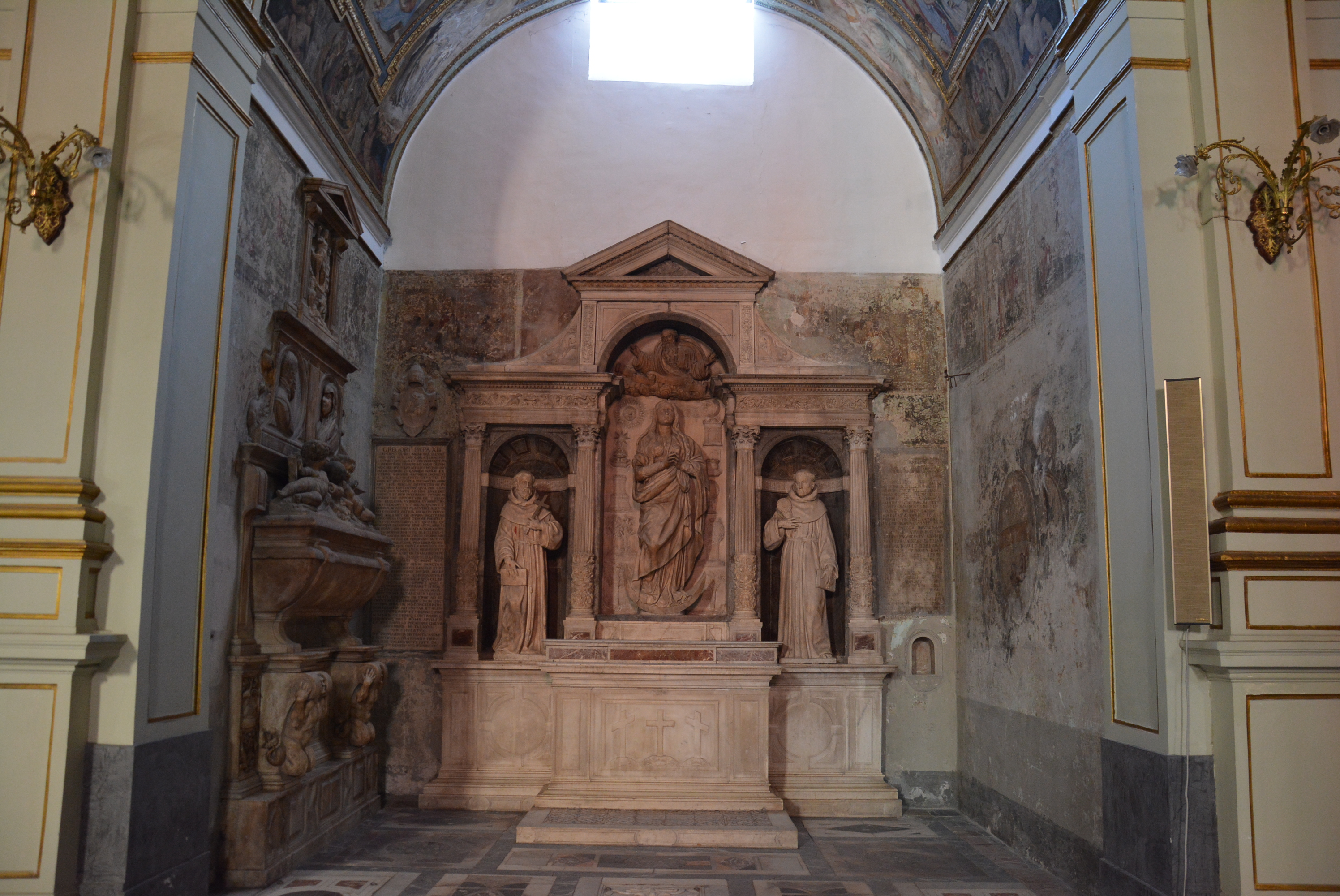 Cappella Turbolo nella chiesa di Santa Maria la Nova a Napoli